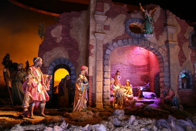 Krippe